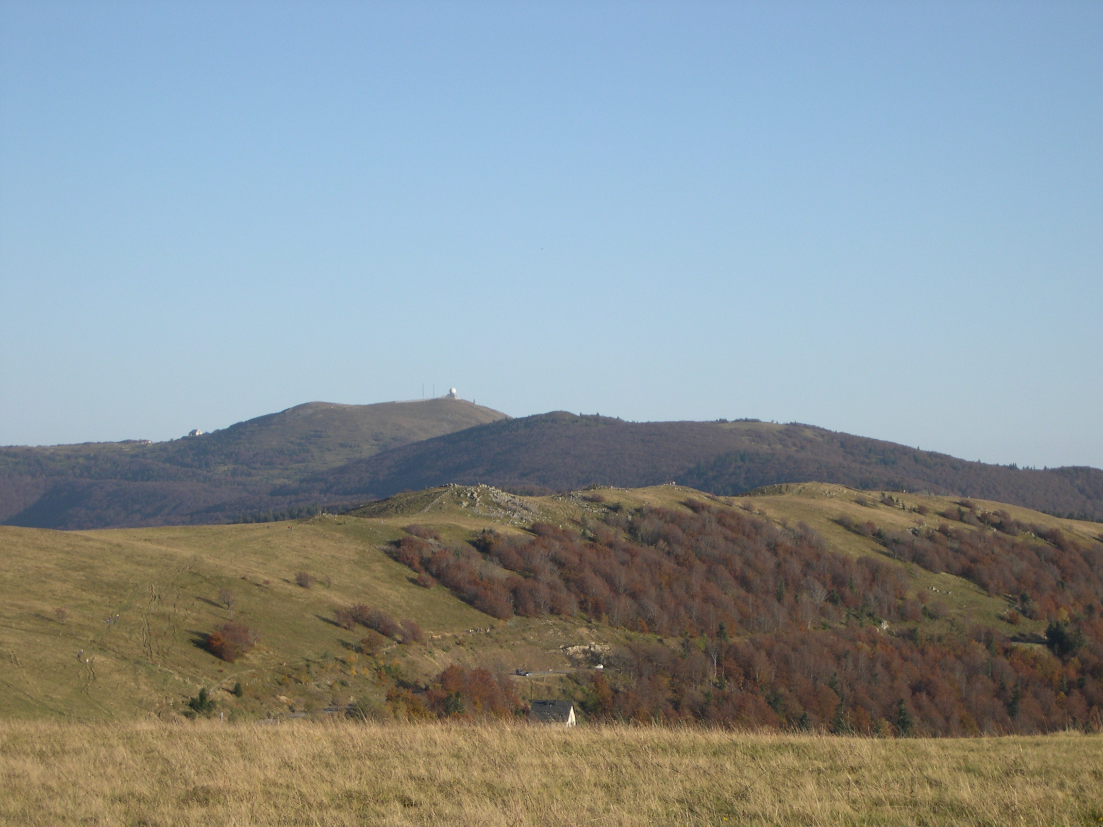 Vue sur les crêtes vosgiennes, en automne, depuis le Markstein, au fond le Grand Ballon 1424 m, précédé du Storkenkopf 1366 m.